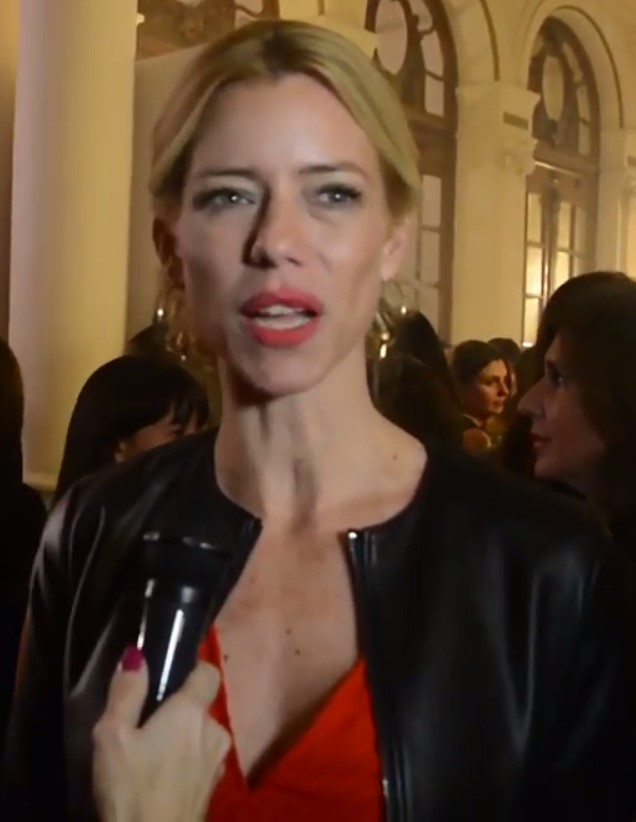 La modelo Nicole Neumann llegó a Salta como invitada a la gala de inauguración de Casa DIR, Mirá el video en donde responde si dejaría a sus hijas ser modelos.